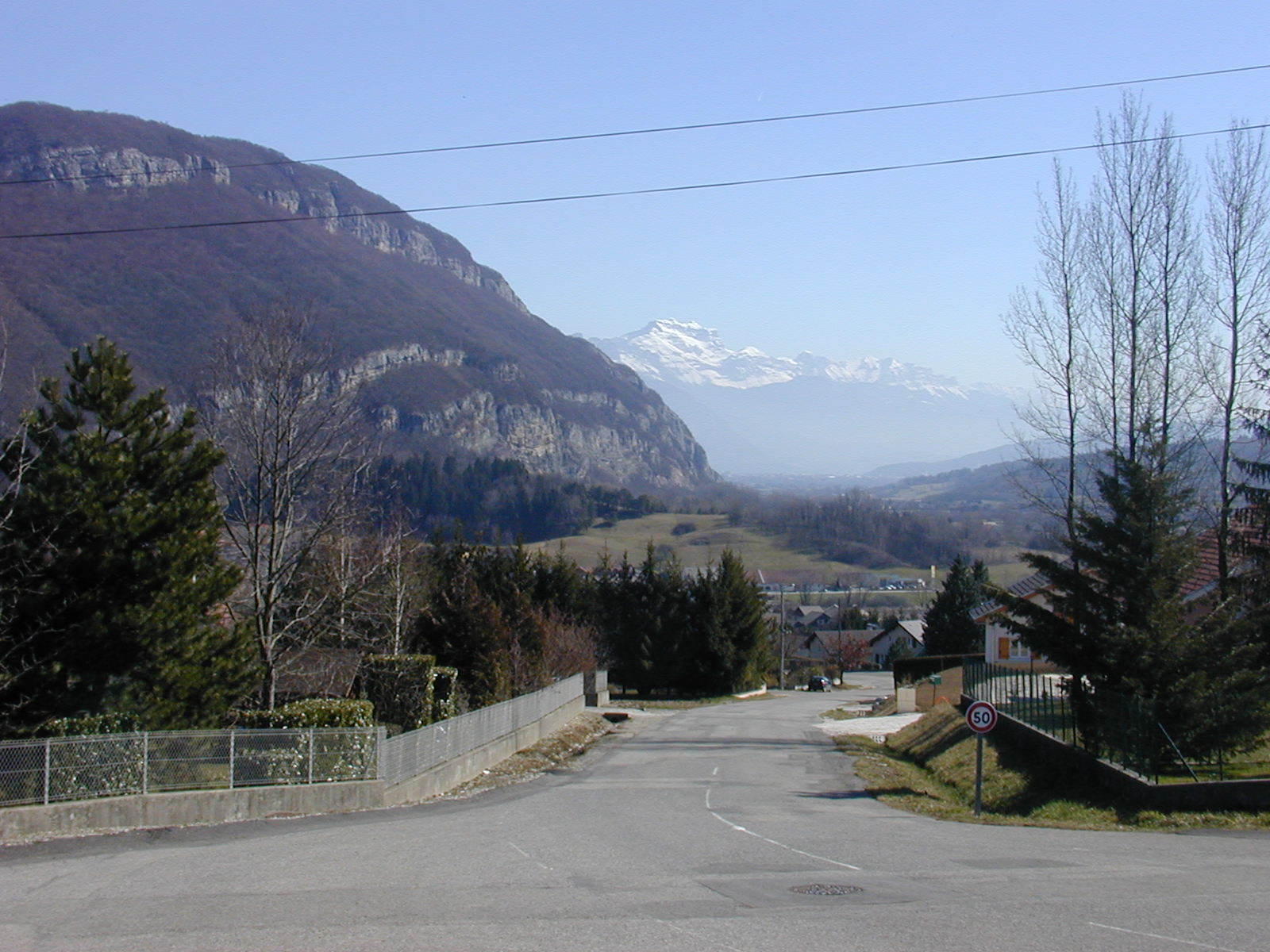 Sillingy, les Bromines (F-74330) au fond, Annecy et la montagne de la Tournette